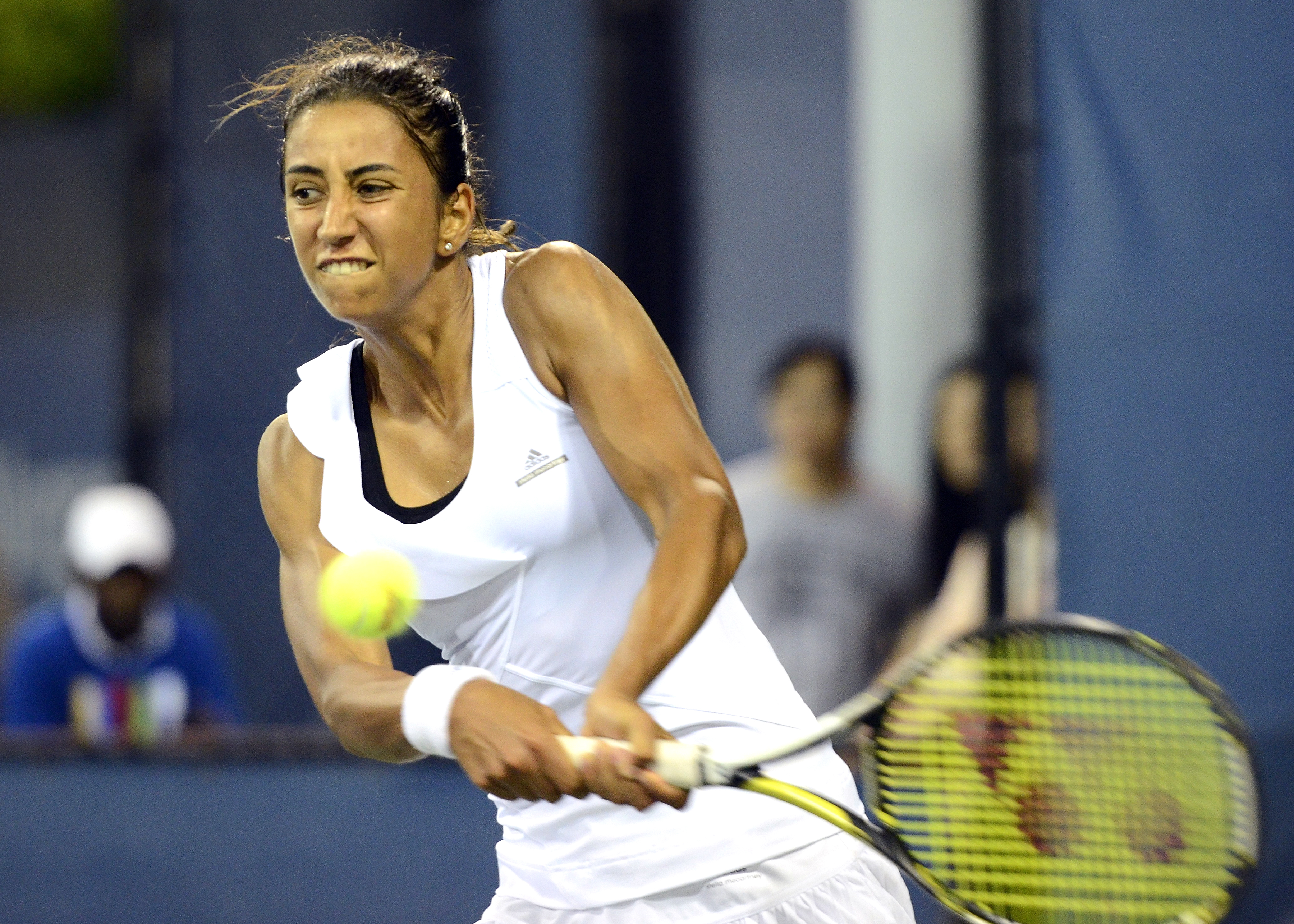 August 21, 2014 Queens, NY Misa Eguchi (JPN) def. Cagla Buyukakcay (TUR)